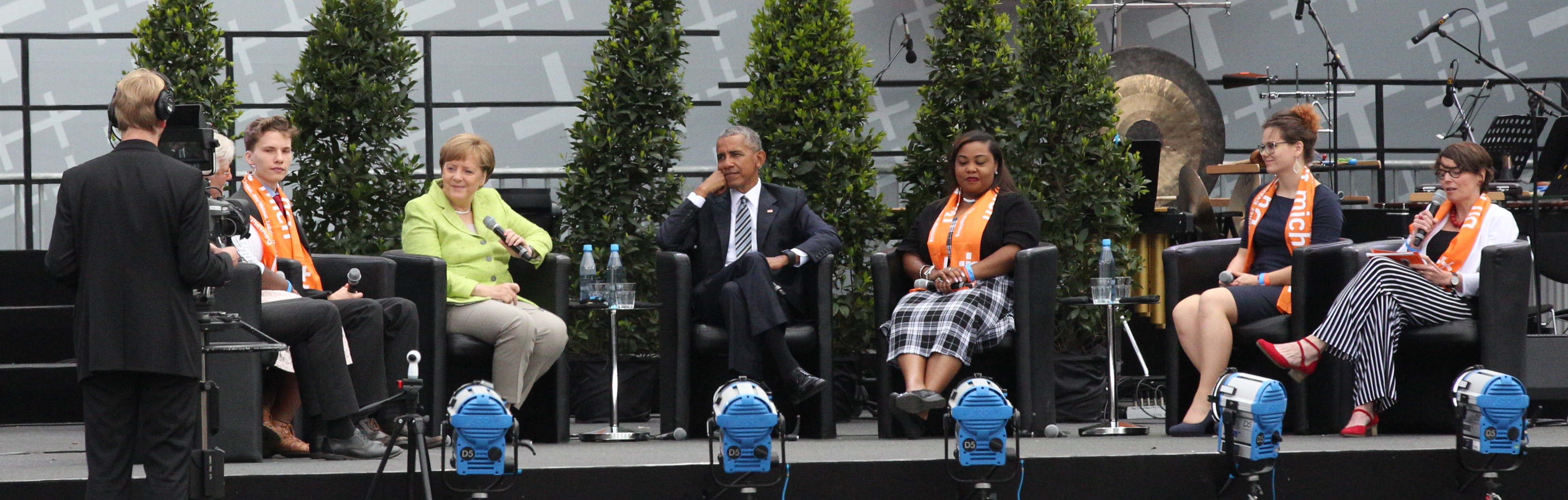 Angela Merkel und Barack Obama während einer Gesprächsrunde am Brandenburger Tor anlässlich des Deutschen Evangelischen Kirchentags 2017 in Berlin und Wittenberg